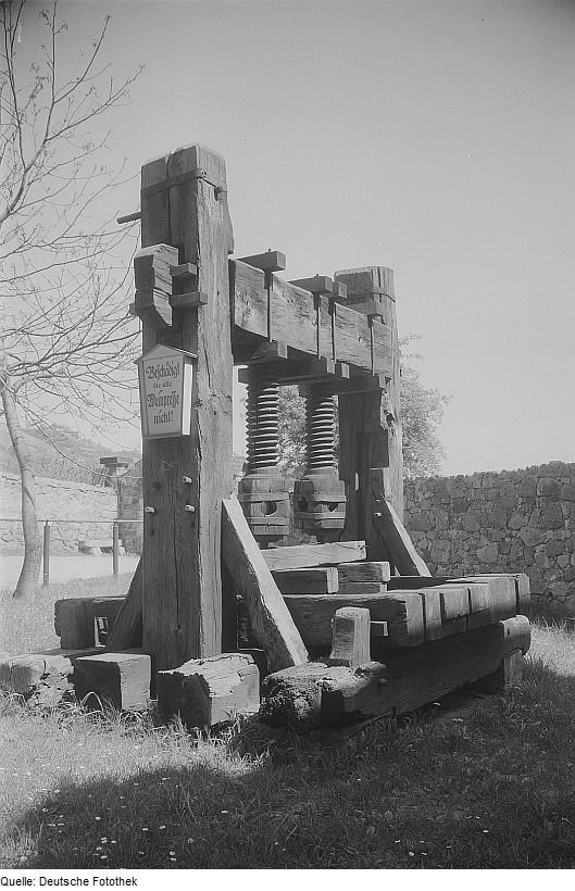 Original image description from the Deutsche Fotothek Radebeul. Hoflößnitz, Alte Weinpresse auf dem Hof